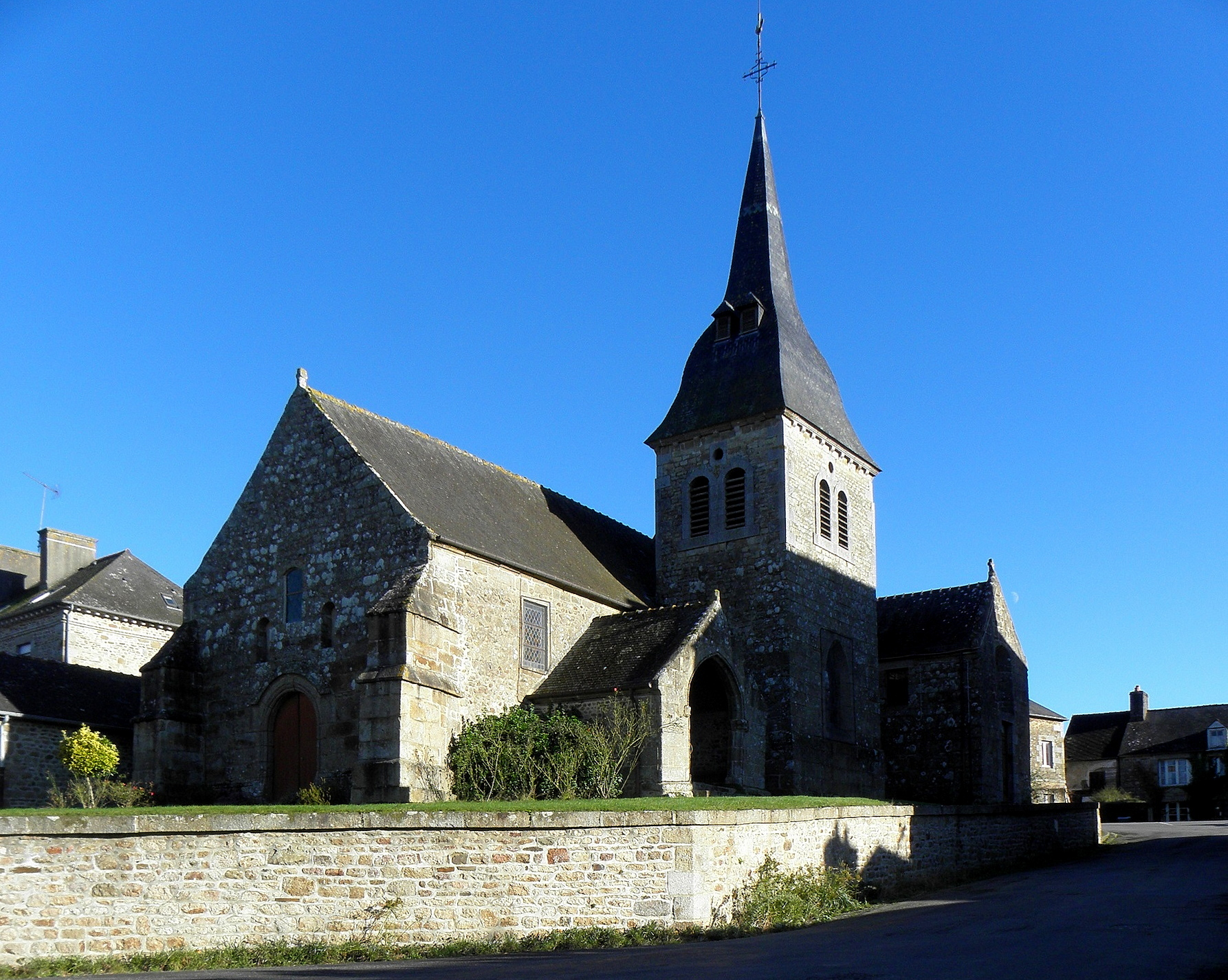 Église Saint-Pierre-et-Saint-Paul de Romazy (35). Façade occidentale et flanc sud.